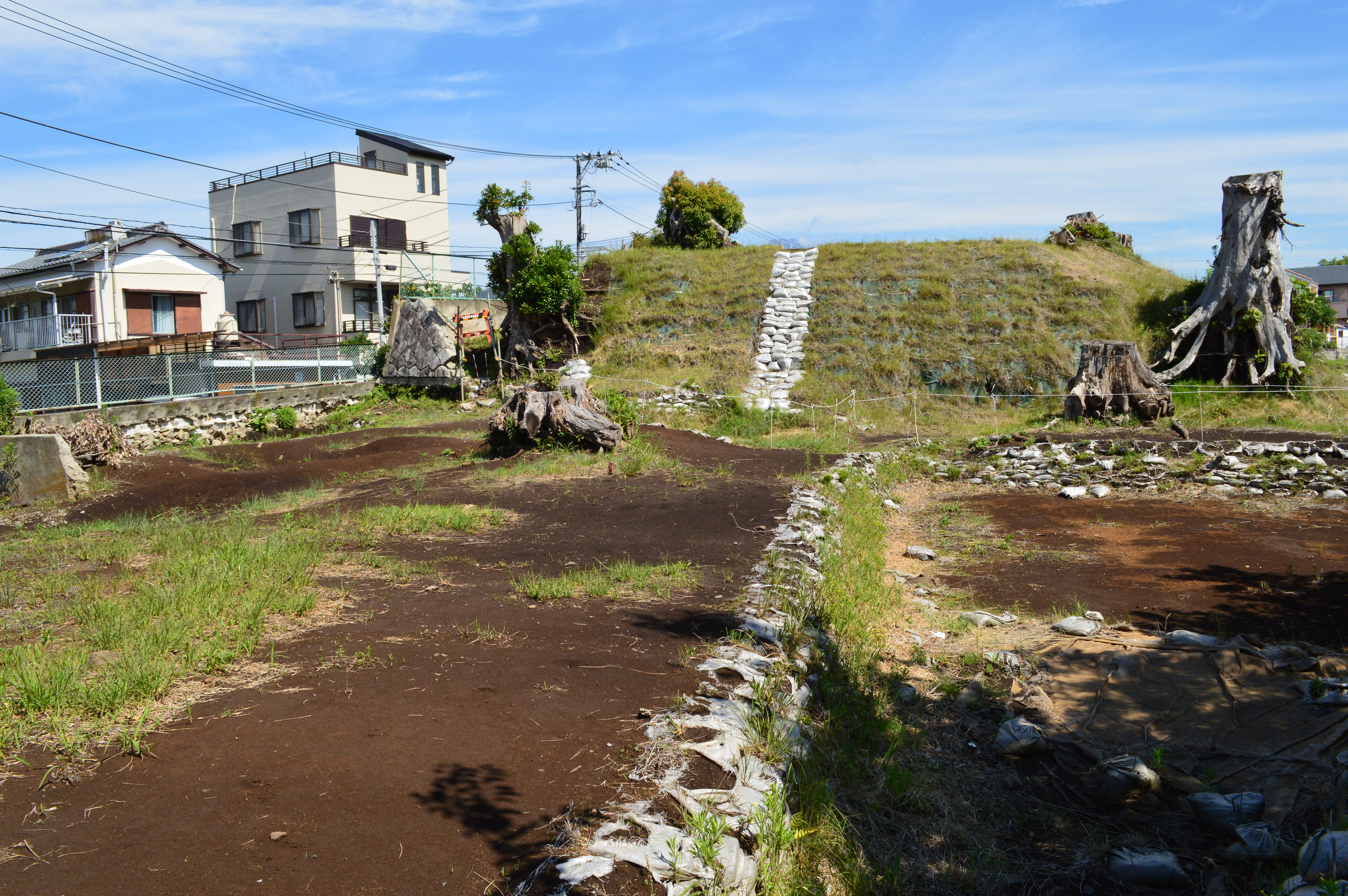 高尾山古墳 (沼津市) 全景